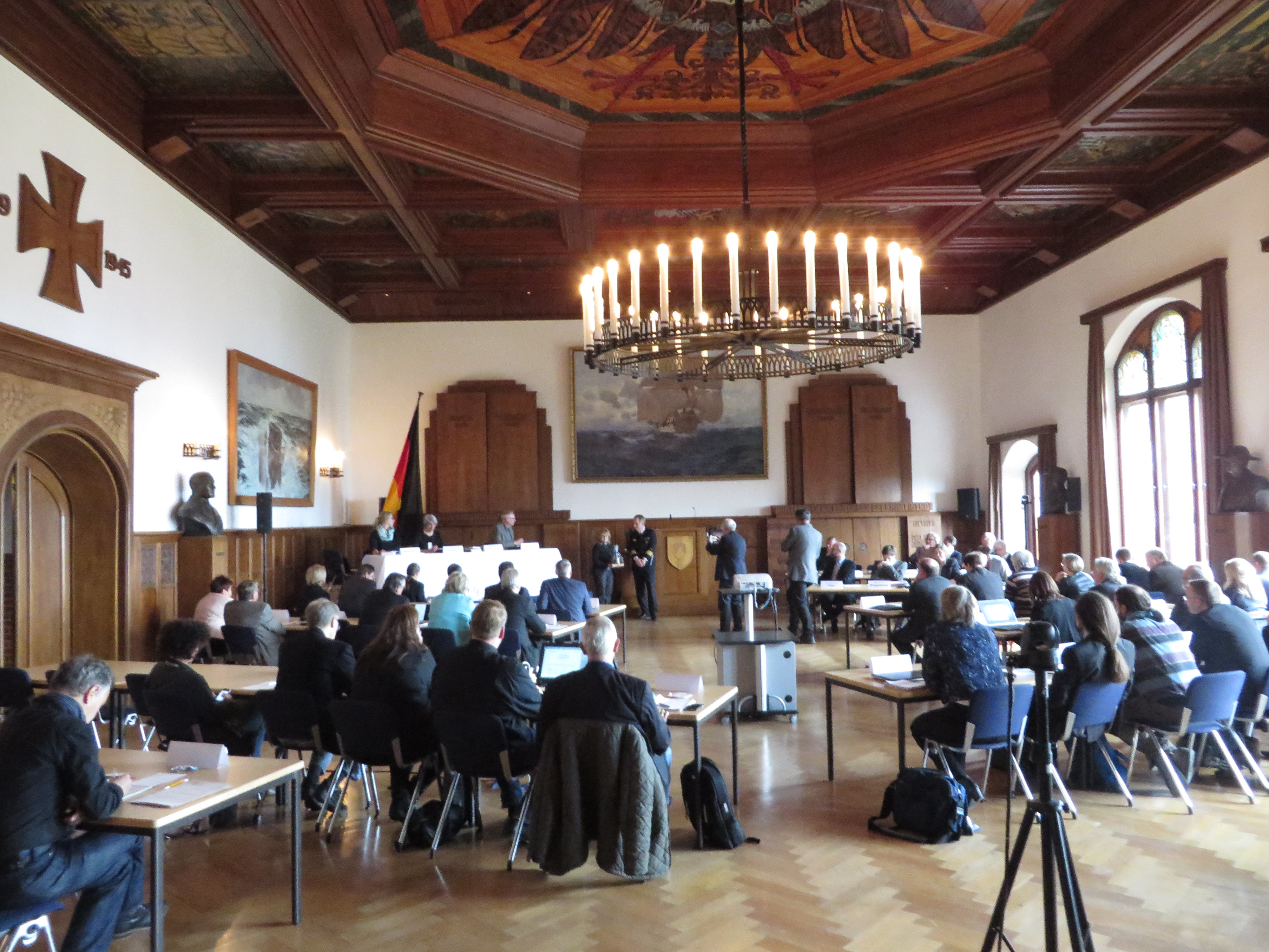 Flensburger Ratsversammlung, 7. Mai 2015, MSM-Aula, Begrüßung, Öffentlicher Teil, Bild 06